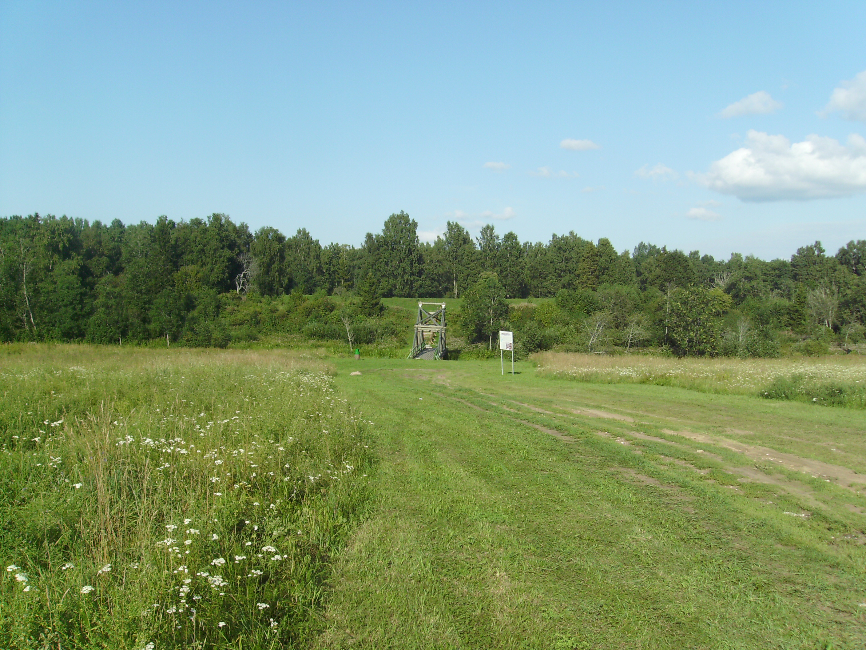 Вид на городище Лооне.